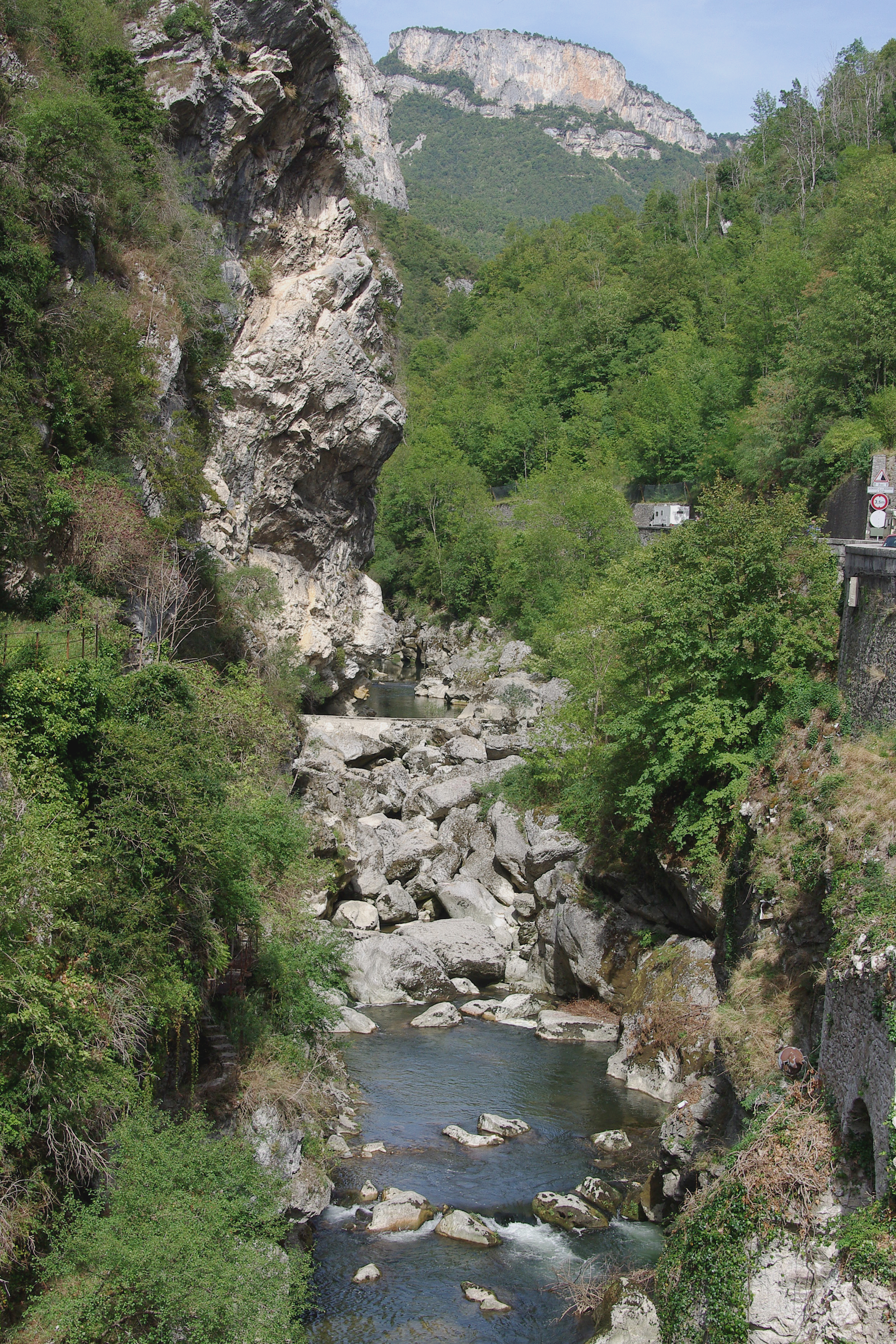 La Bourne a creusé des gorges impressionnantes dans les calcaires du Parc naturel régional du Vercors.